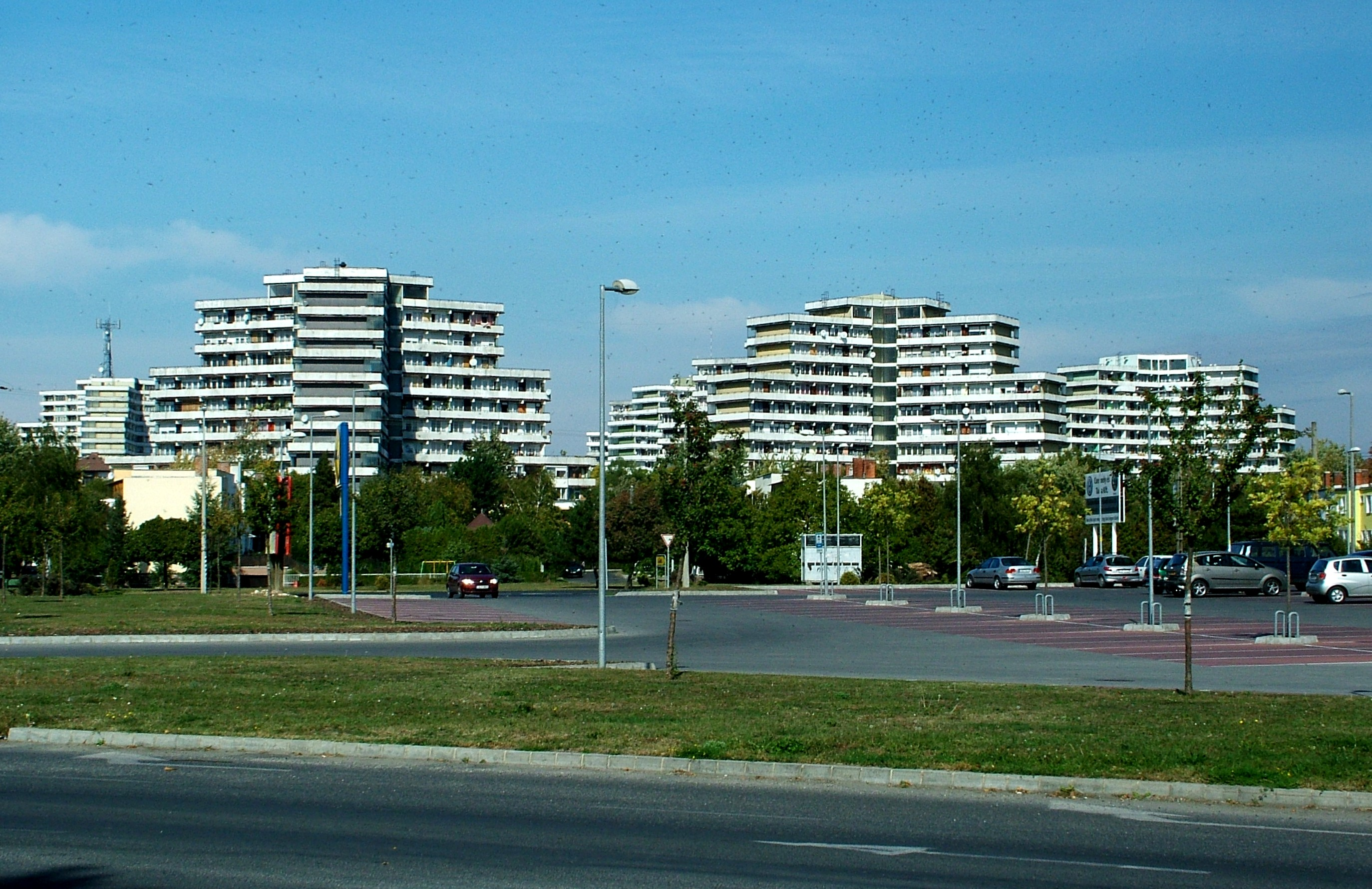 Tapolcai Y-házak (Terv ZÁÉV: Kiss T./Horváth G.)